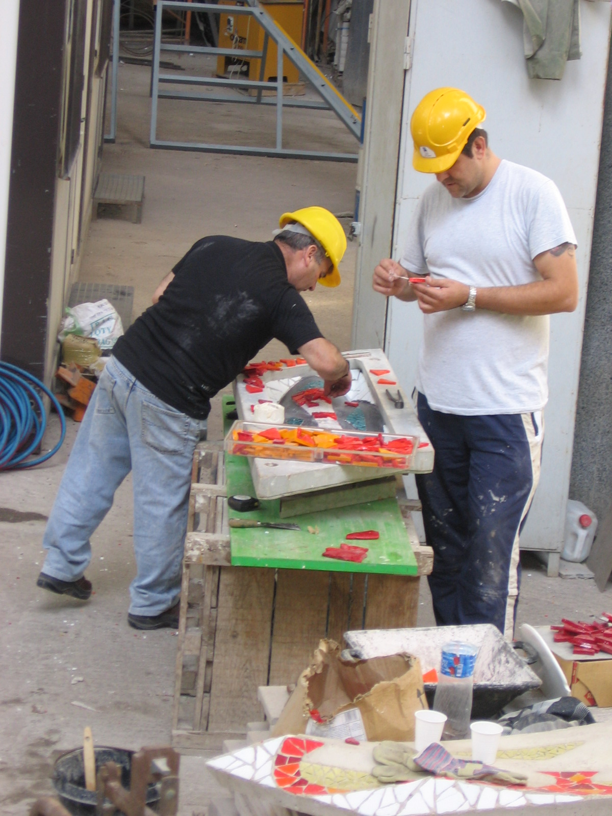 Mosaists assembling a mosaic at the Temple Expiatori de la Sagrada Família, Barcelona